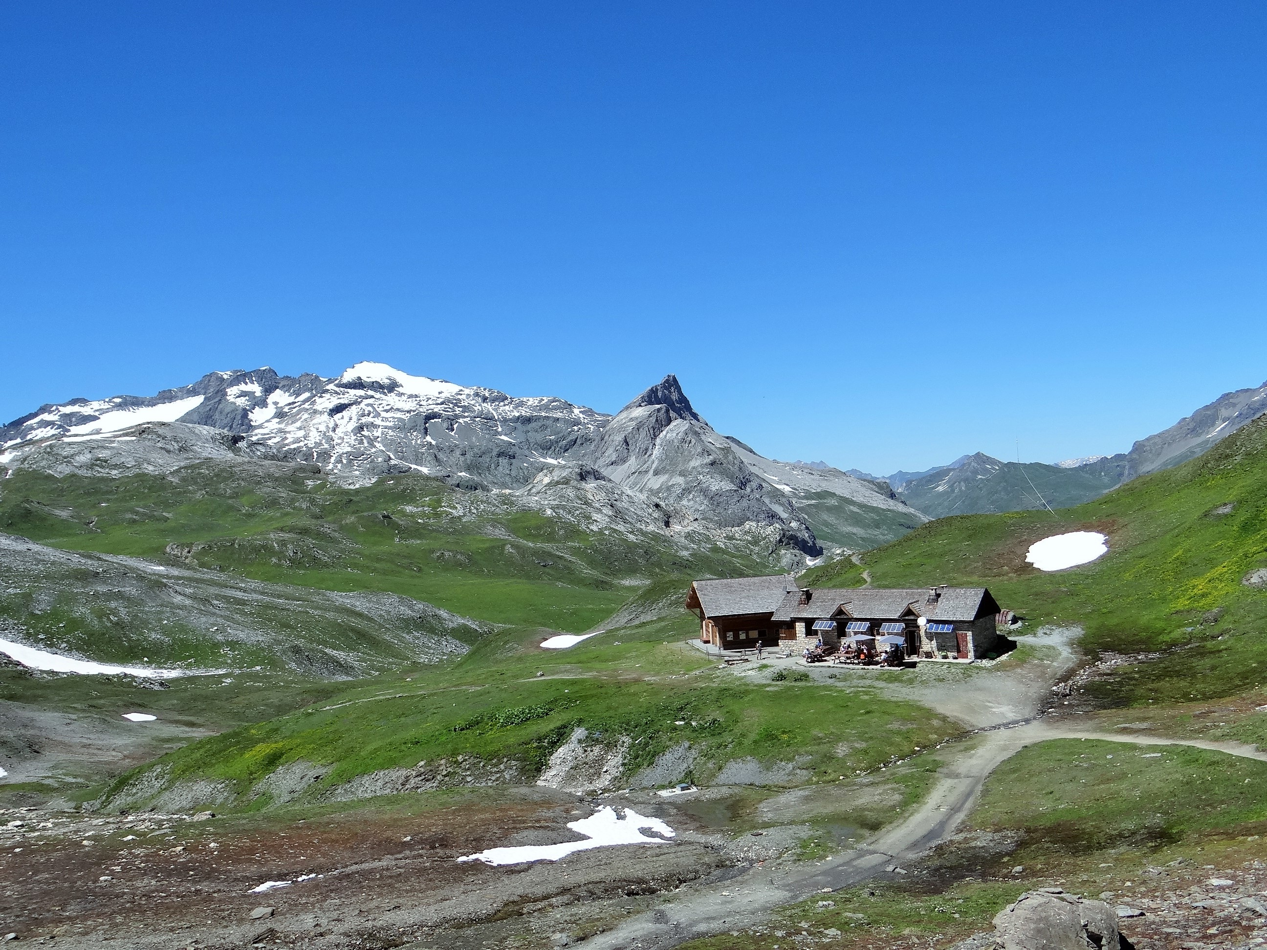 Refuge du col du Palet (2652m)